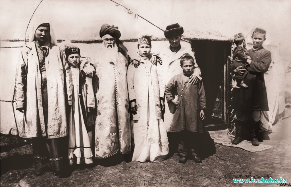 Қазақша (кирил): Шортанбай жырау Қанайұлы отбасымен